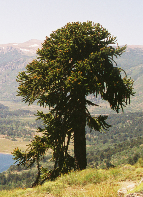 araucaria edicion de un trabajo propio de un usuario 2007 MonicaSP54